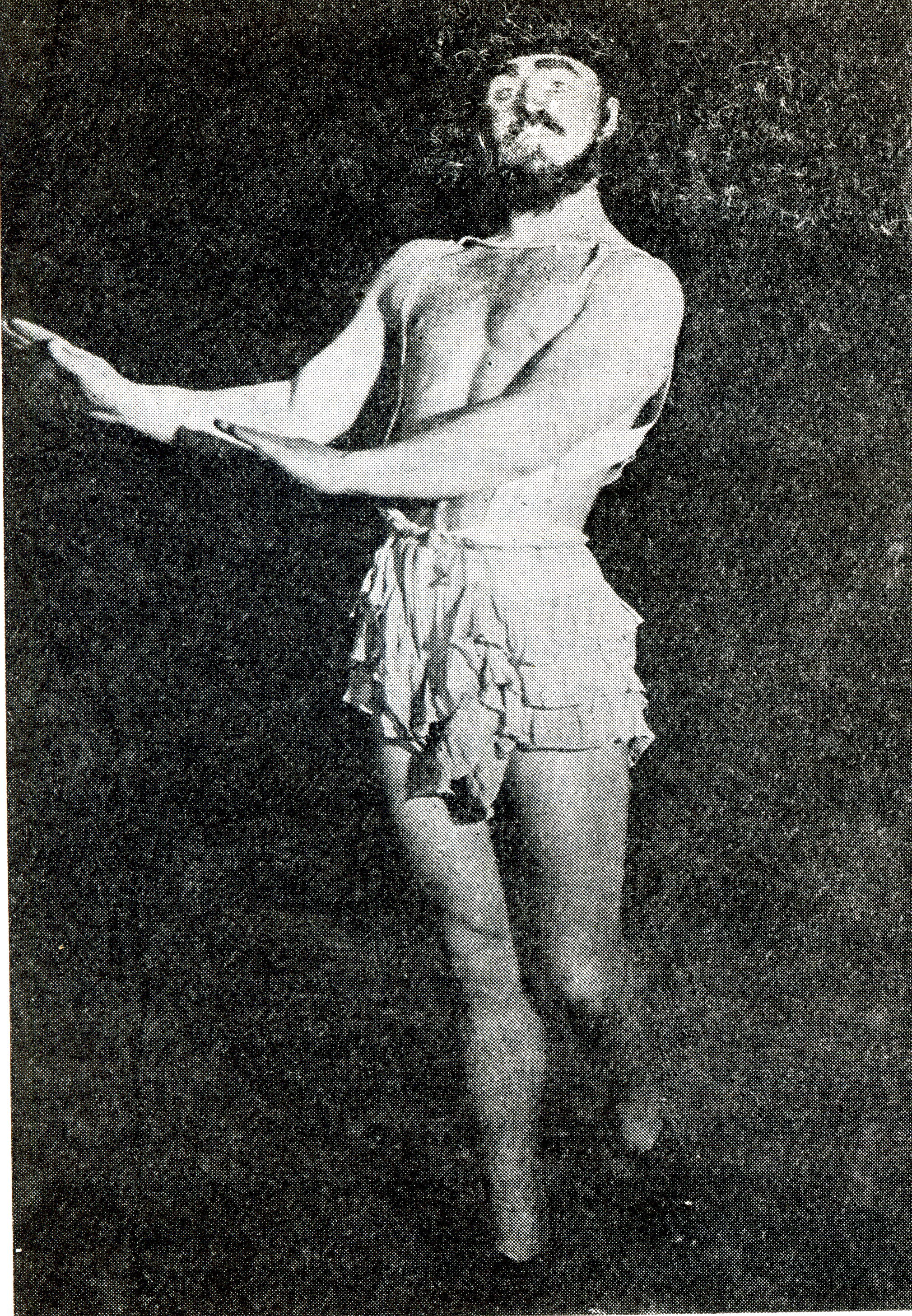 Adolf Dymsza w Pstryku